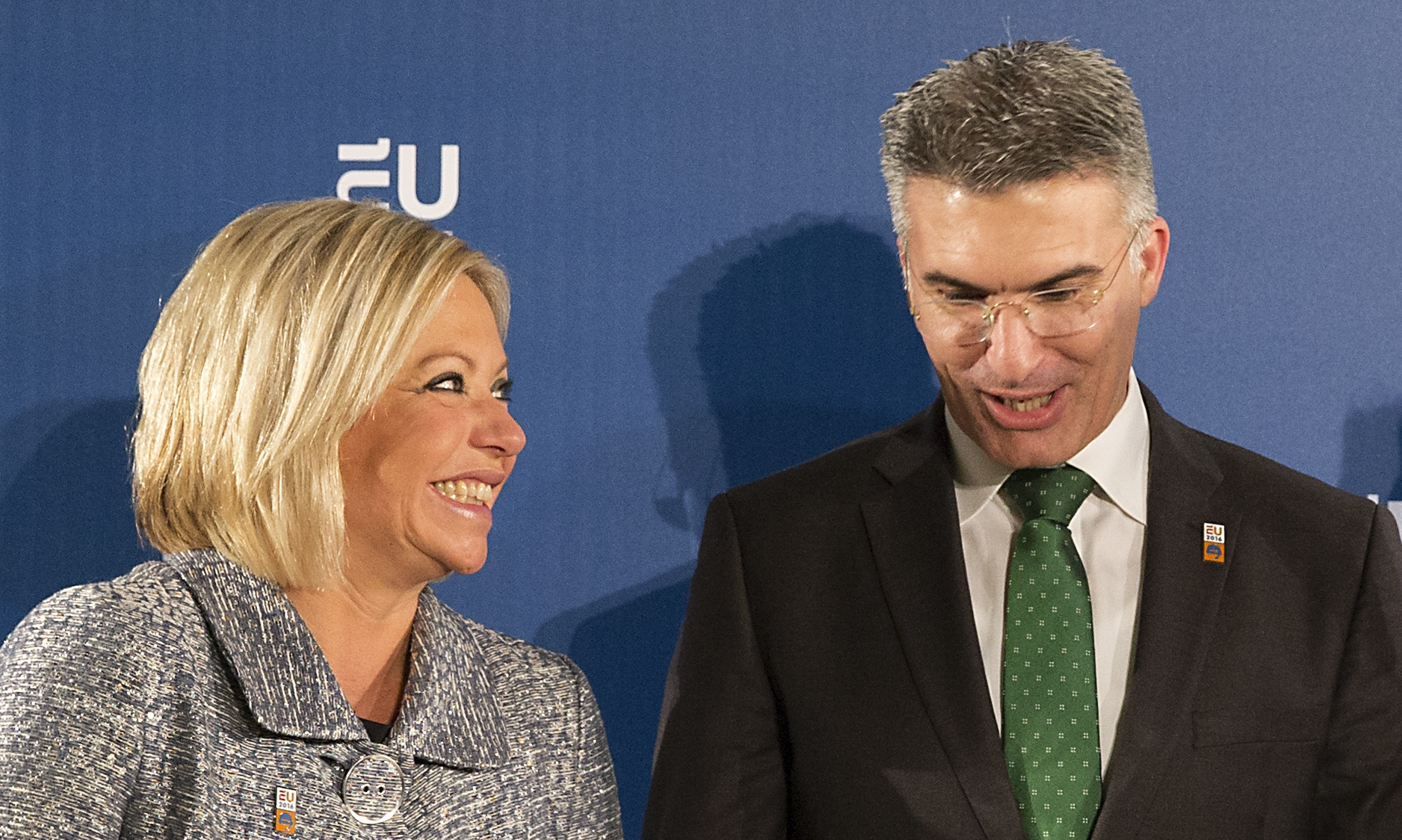 Amsterdam, 5 februari 2016 / Amsterdam 5th of Februari. Minister van Defensie Jeanine Hennis-Plasschaert en Frederica Mogherini ontvangen de ministers van Defensie voorafgaand aan de informele bijeenkomst van de Europese ministers van Defensie in het Scheepvaartmuseum in Amsterdam. Dutch minister of Defense Jeanine Hennis-Plasschaert and Frederica Mogherini meeting with ministers of Defence prior to the informal meeting of the ministers of Defence in the Scheepvaart Museum in Amsterdam. Carmelo Abela (Malta)